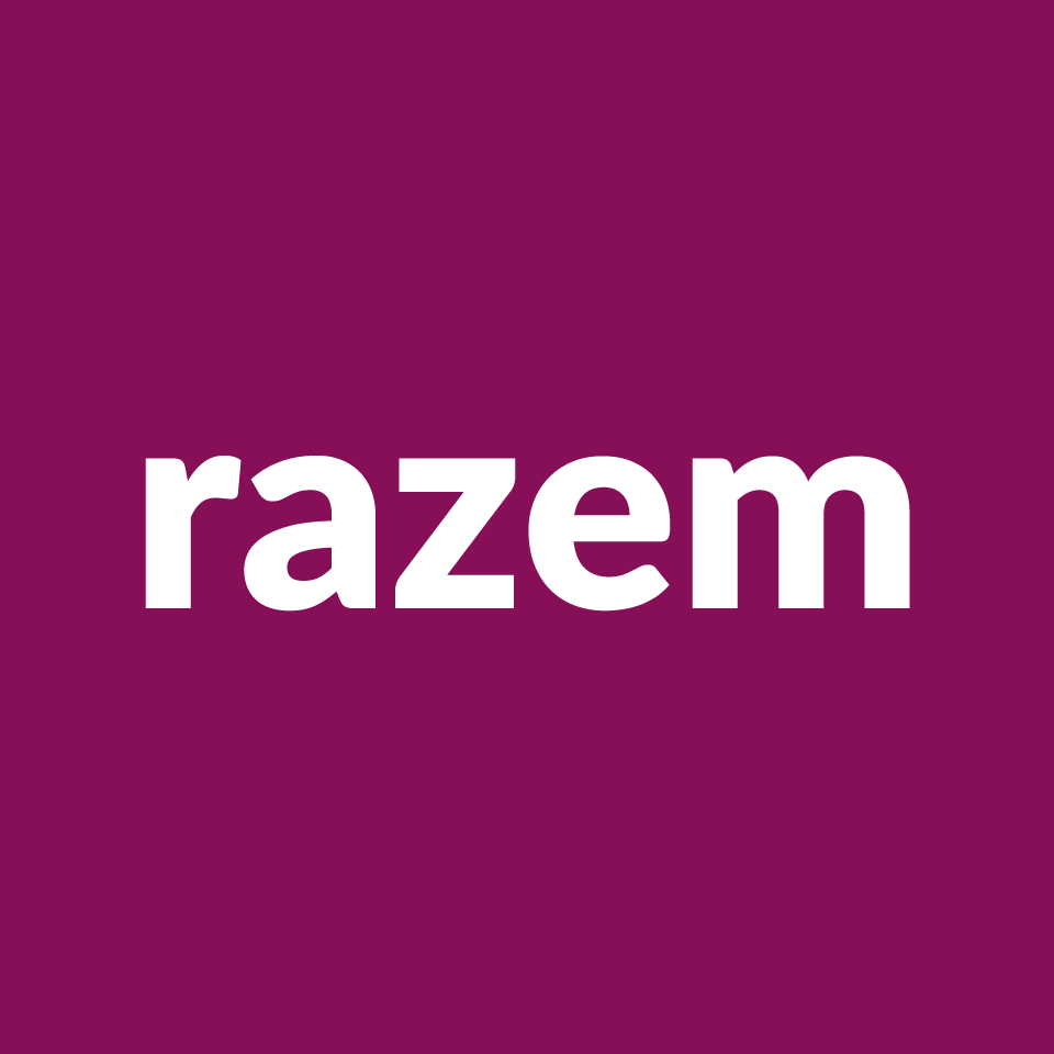 Logo Partii Razem